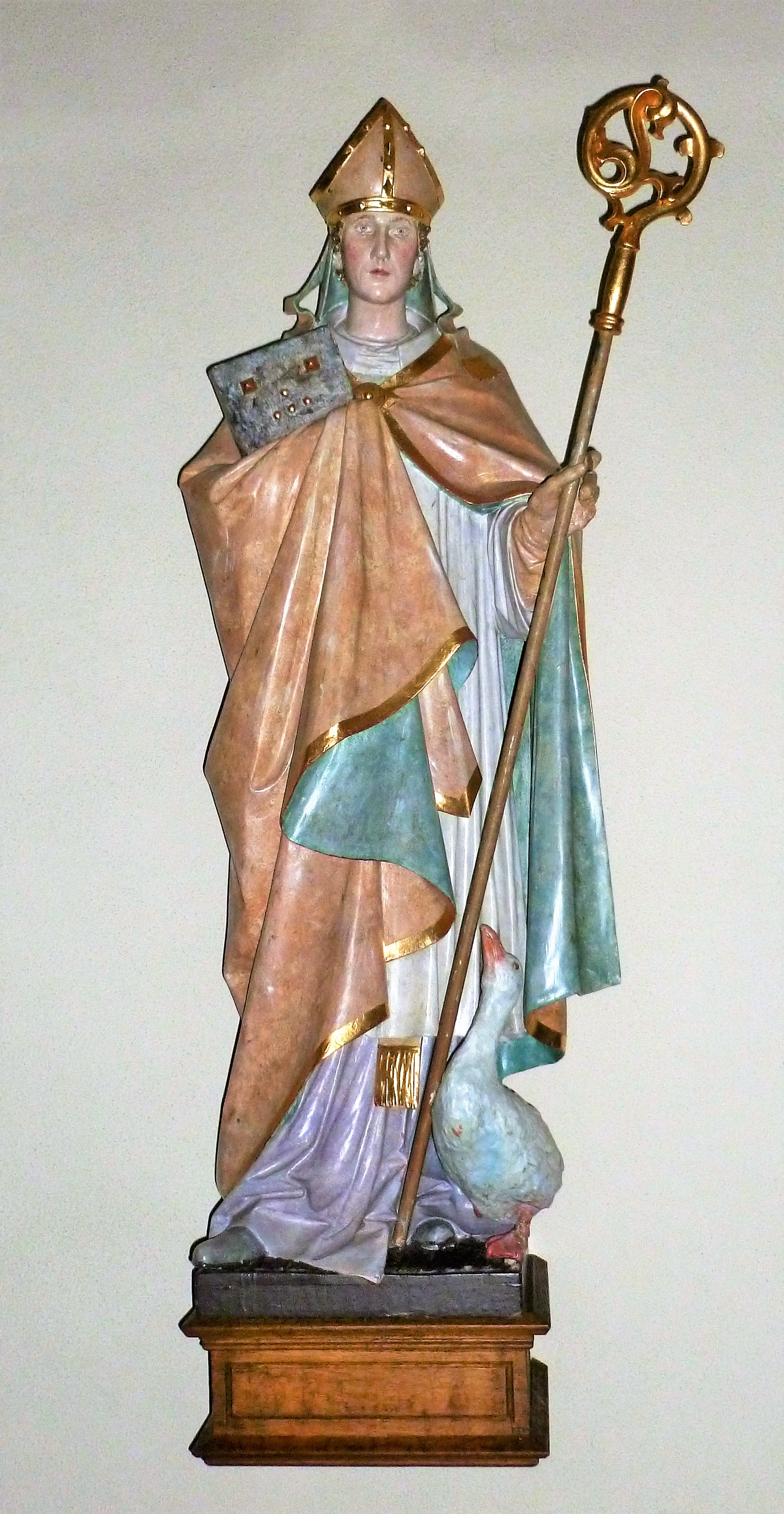 Den Hellege Mäerten, Bëschof vun Tours an der Kierch zu Maarnech. Dem Mäerten säin Attribut ass d'Gäns.